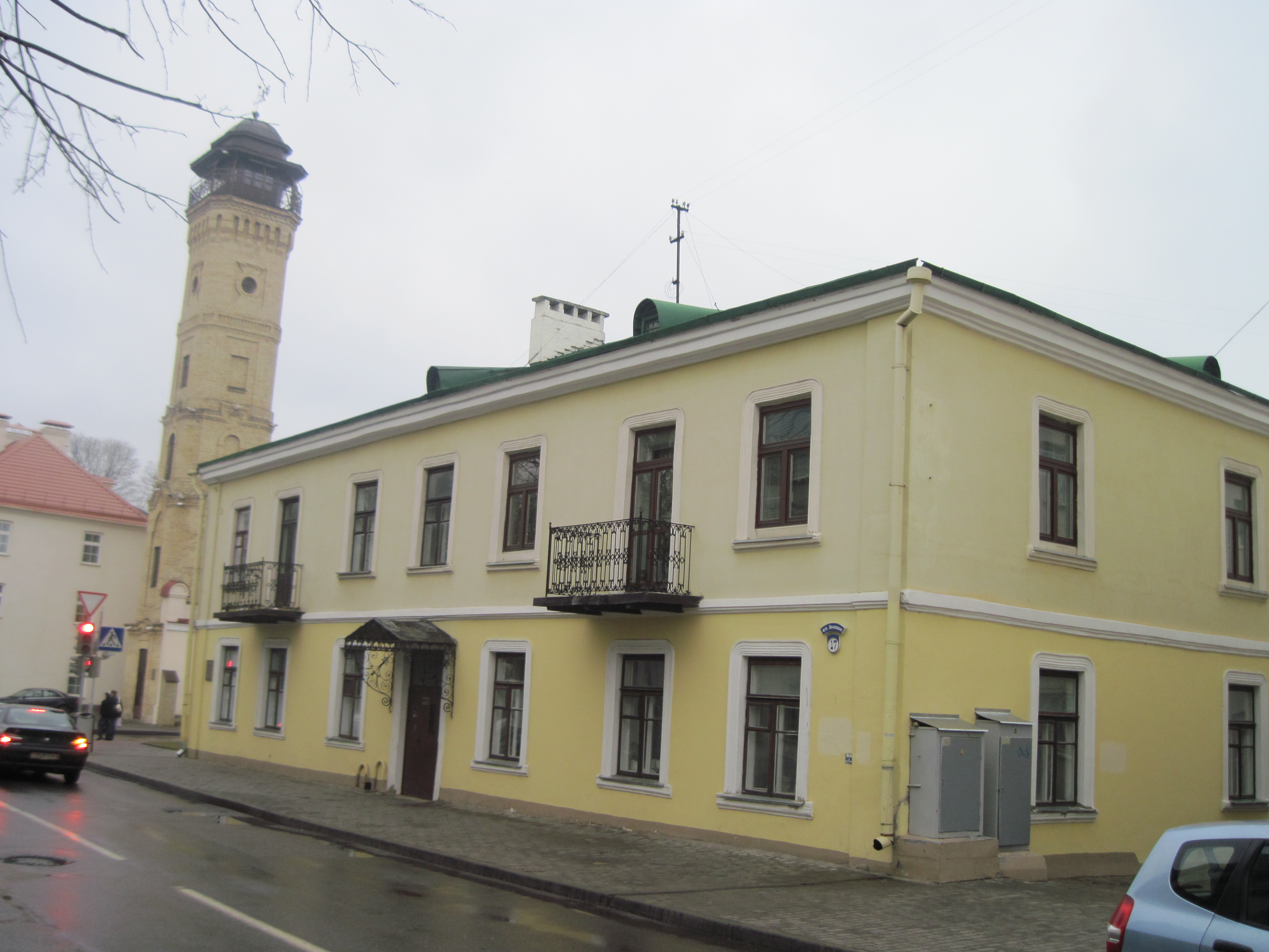 Беларуская (тарашкевіца): Гродна Савецкая, 17